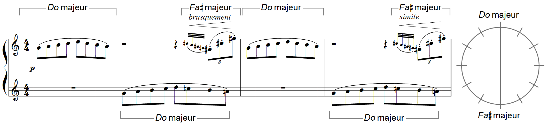 Debussy - Etude "pour les cinq doigts", mes.11-14